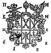 Родавыя гербы XVI i XVII стст. Віленская школа. Герб мітрапаліта выгравіраваны ў Вільні і пададзены як цікавы прыклад біскупскіх рэгаліяў (вертыкальна пастаўленыя мітра і працэсійны крыж) ды знакаў пасады (булава і дзяржаўны меч уверсе пад княжацкай каронай) разам з накладным шчытом i грэбенем.